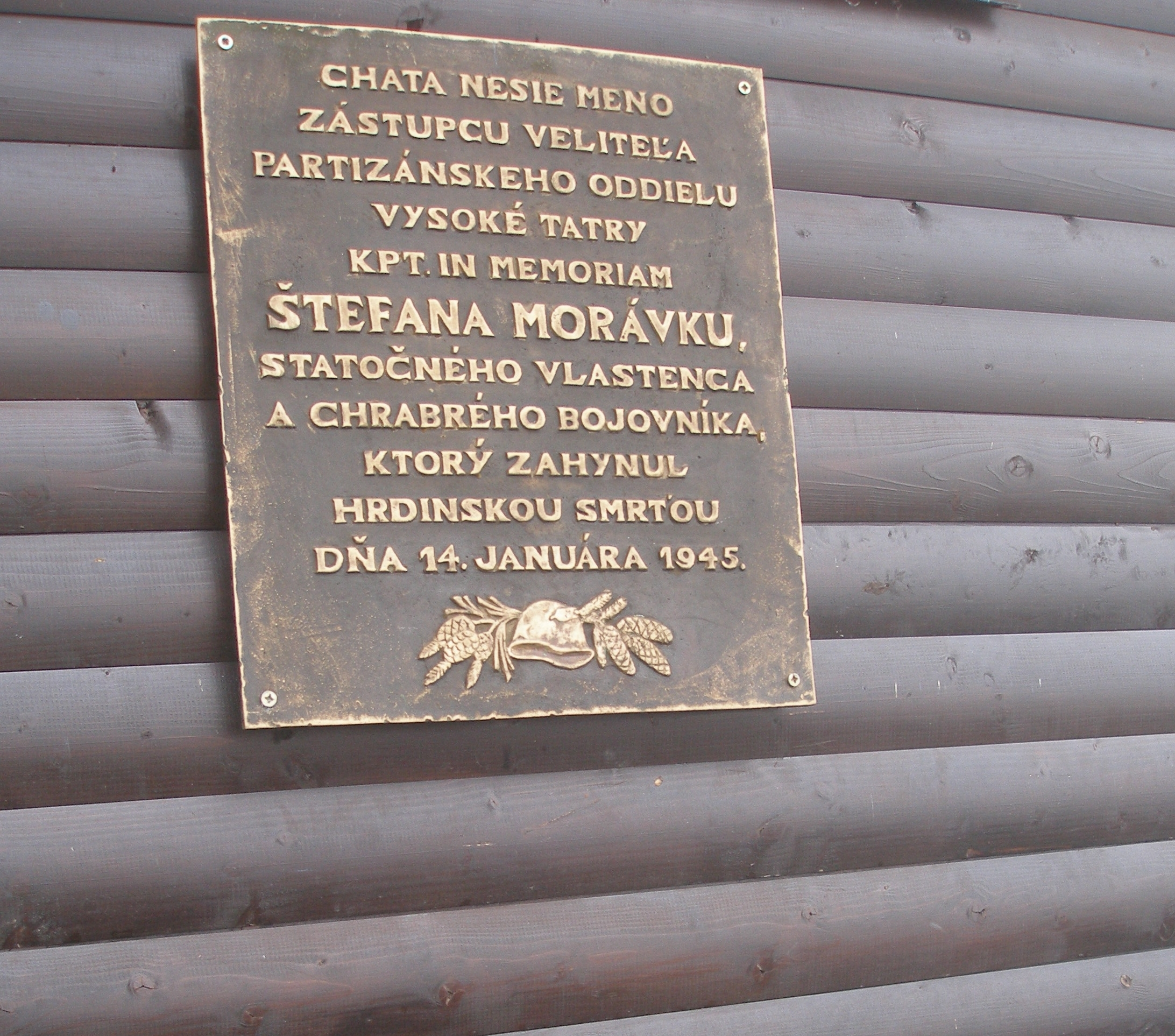 Popradské pleso pamätná tabuľa na chate kapitána Morávka